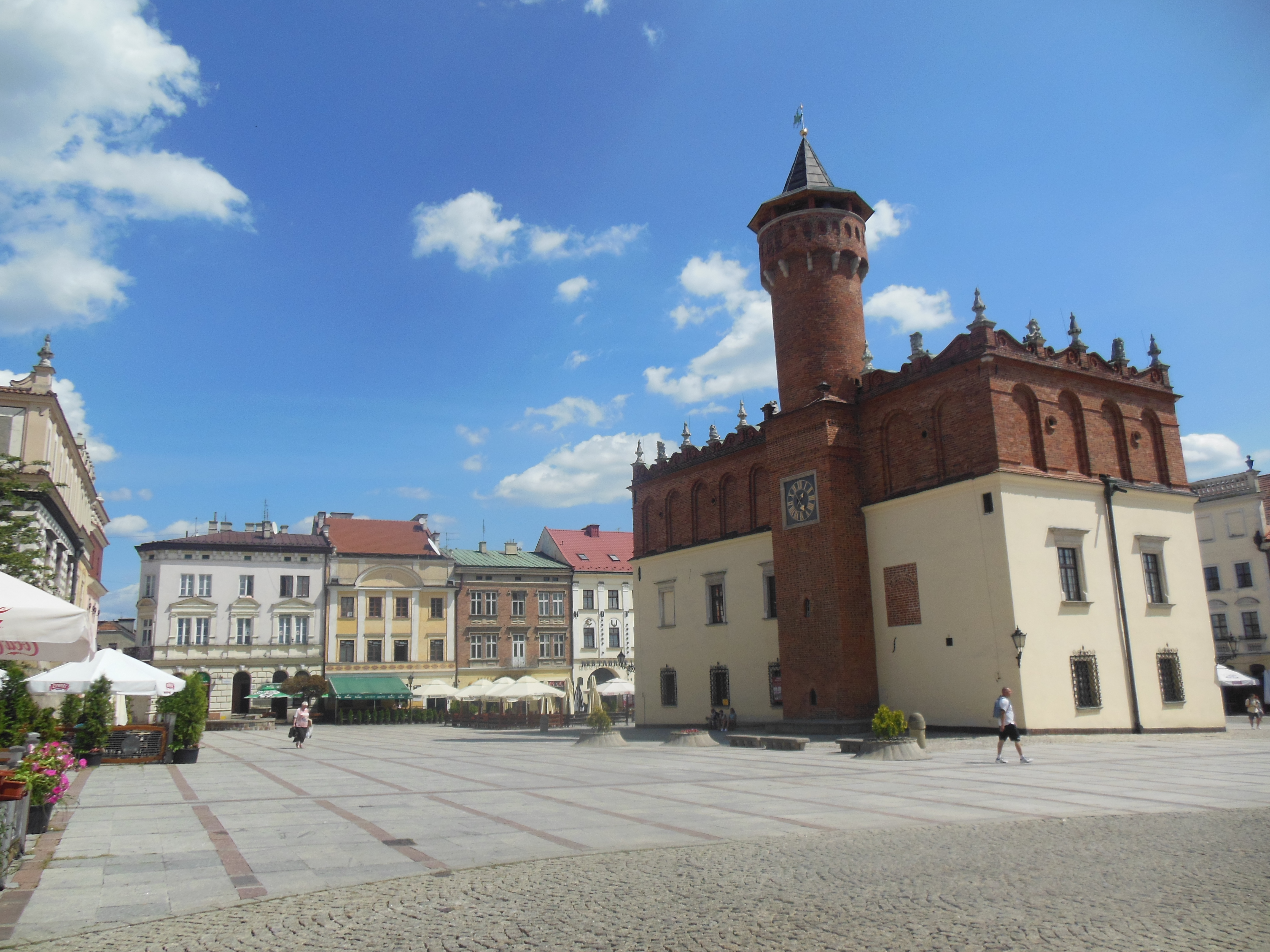 Rynek w Tarnowie